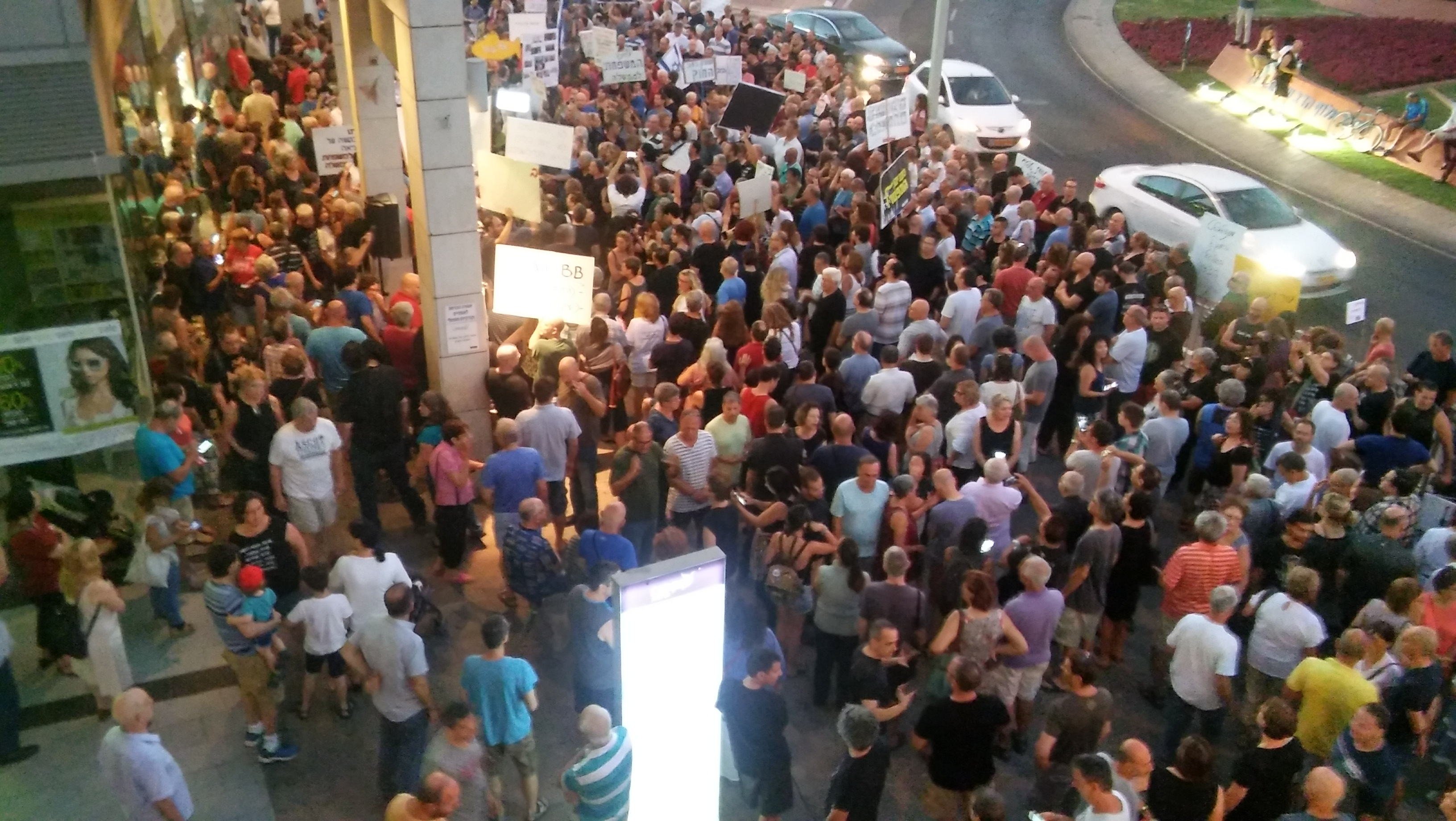 הפגנות נגד היועמ"ש פ"ת